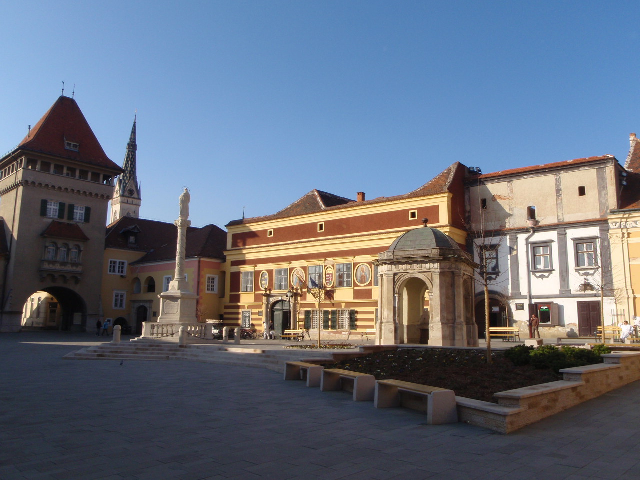 Kőszeg, Óváros, Jurisics tér: balra a Hősök tornya, középen a Városháza, háttérben a Jézus Szíve Plébánia templom, előtérben a Városi kút és a Mária szobor